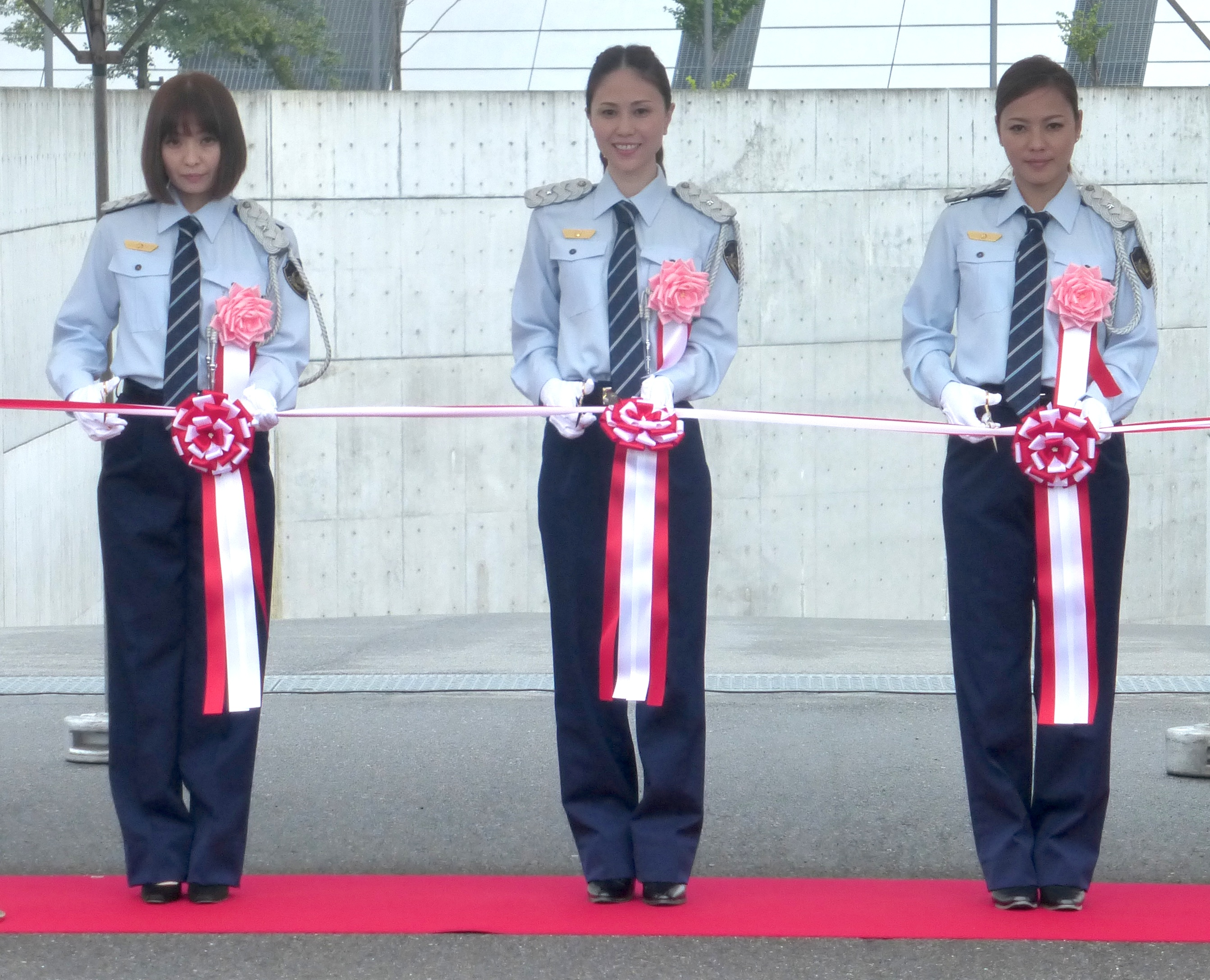 MAX（マックス）は、日本の音楽グループ。東京拘置所にて